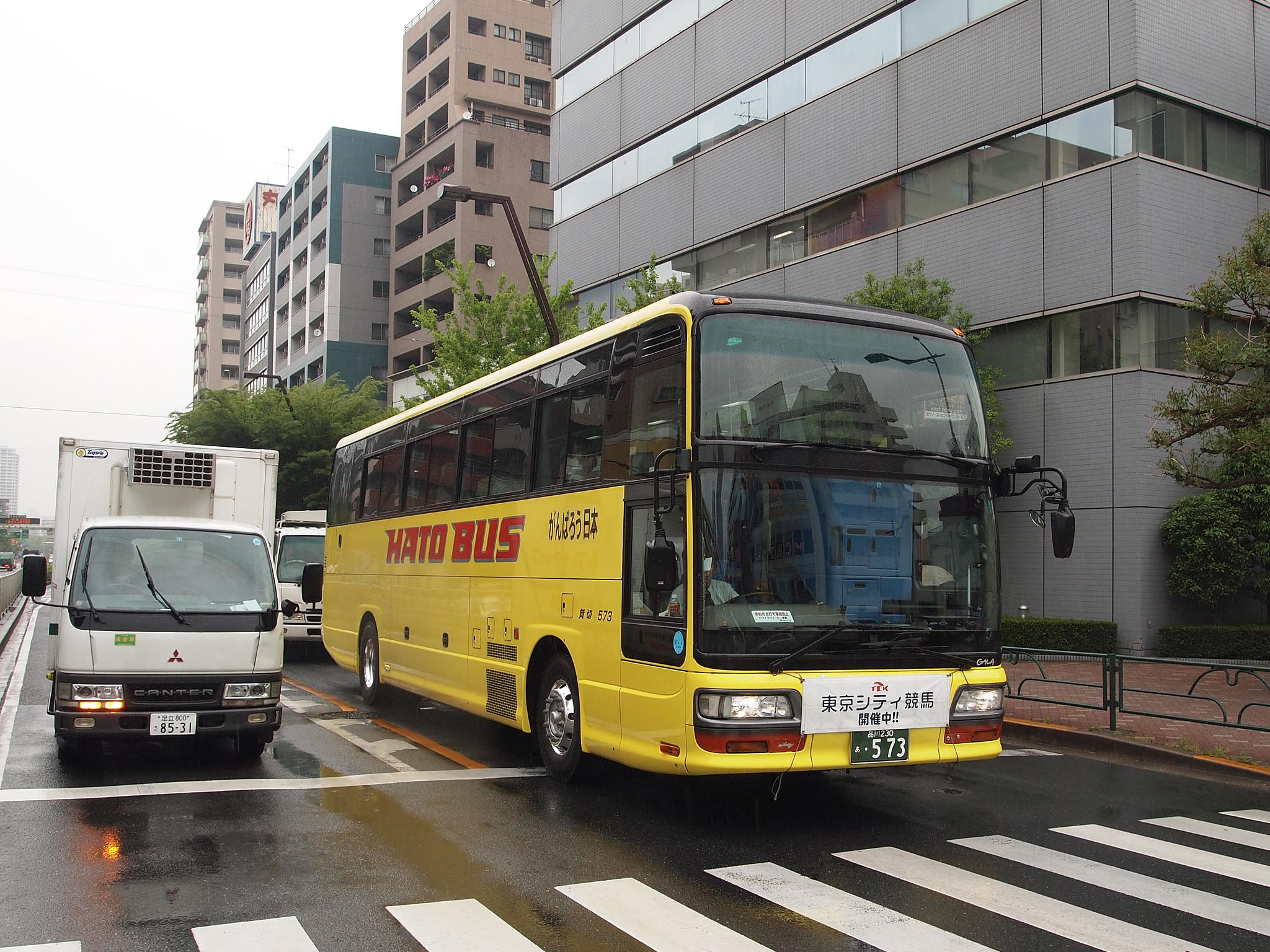 はとバスが運行する錦糸町駅からの東京シティ競馬（大井競馬場）シャトルバス。 型式：いす・ゞガーラGHD KL-LV774R 品川230あ・573 撮影地：東京都江東区木場